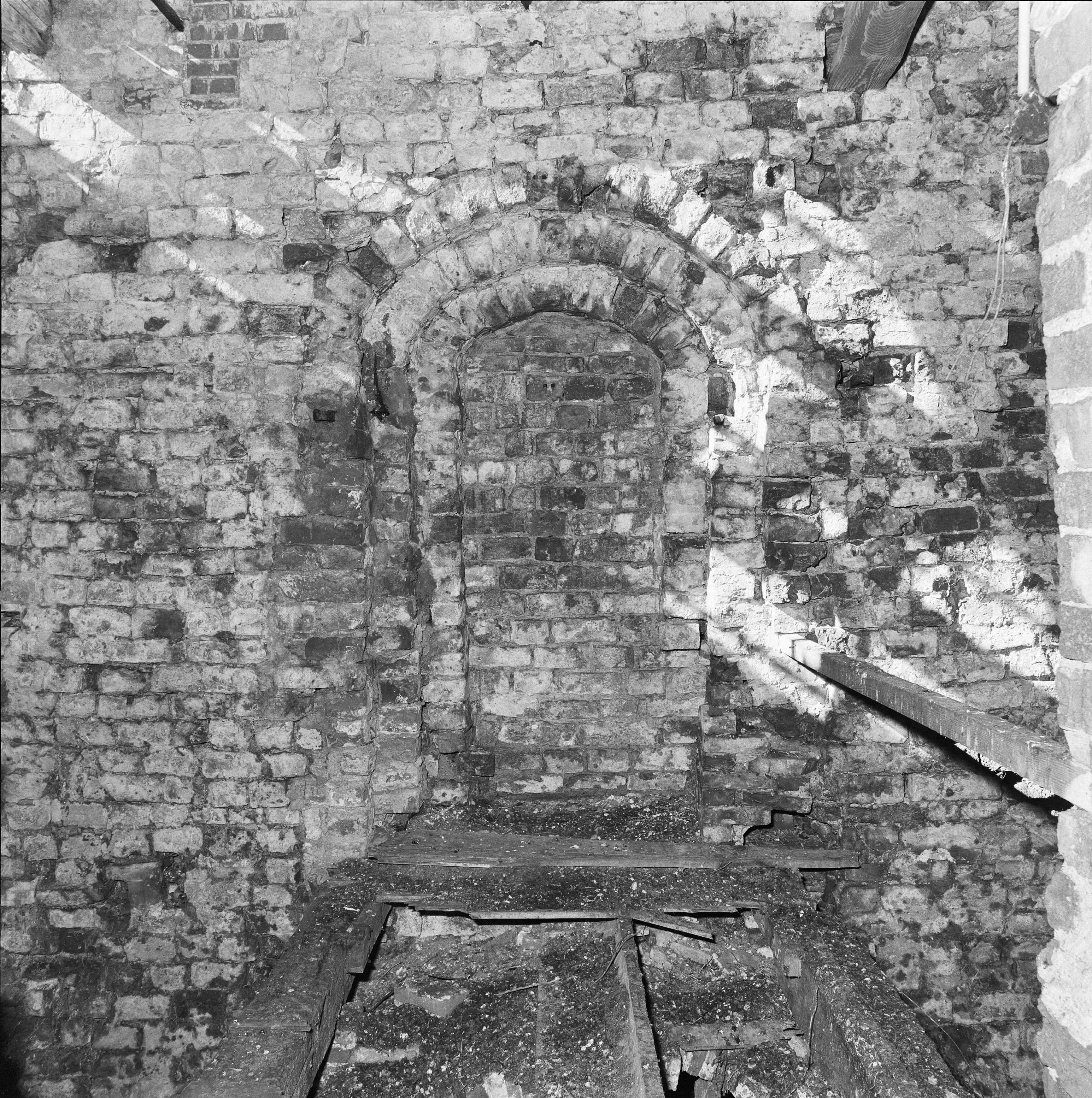 Nederlands Hervormde Kerk: Interieur